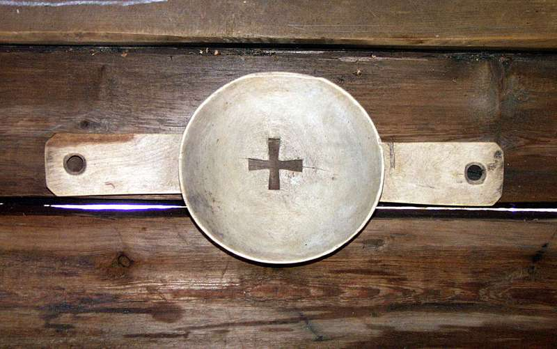 Melkesil av tre, datert 1759, fra Rendalen, Hedmark. Diameter 19 cm. Foto Haakon Harriss / Norsk Folkemuseum. NFL.15843